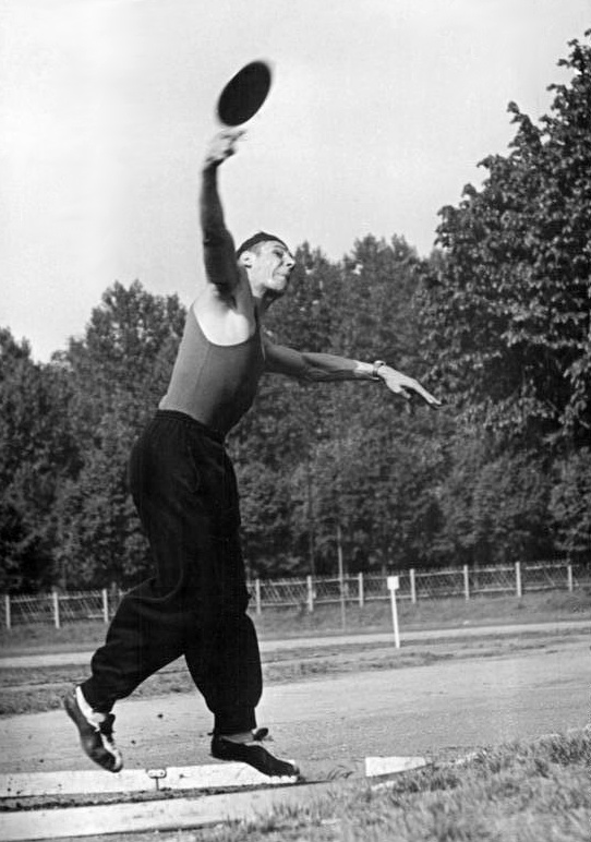 Leipzig, DHfK, Diskuswerfen Zentralbild Illner 19.5.1953 Wer studiert an der Deutschen Hochschule für Körperkultur in Leipzig? Befähigte Kinder von Arbeitern und Bauern aus allen Teilen der Deutschen Demokratischen Republik studieren an der Deutschen Hochschule für Körperkultur in Leipzig, um eines Tages als Sportlehrer und Sportmeister den demokratischen Aufbau in der DDR zu unterstützen. UBz: Horst Röder aus Haumburg ist Maler von Beruf und trainiert jetzt im vierten Semester für den Leistungssport. Er will sein Studium so erfolgreich abschliessen, daß er als wissenschaftlischer Aspirant von der Hochschule übernommen werden kann.